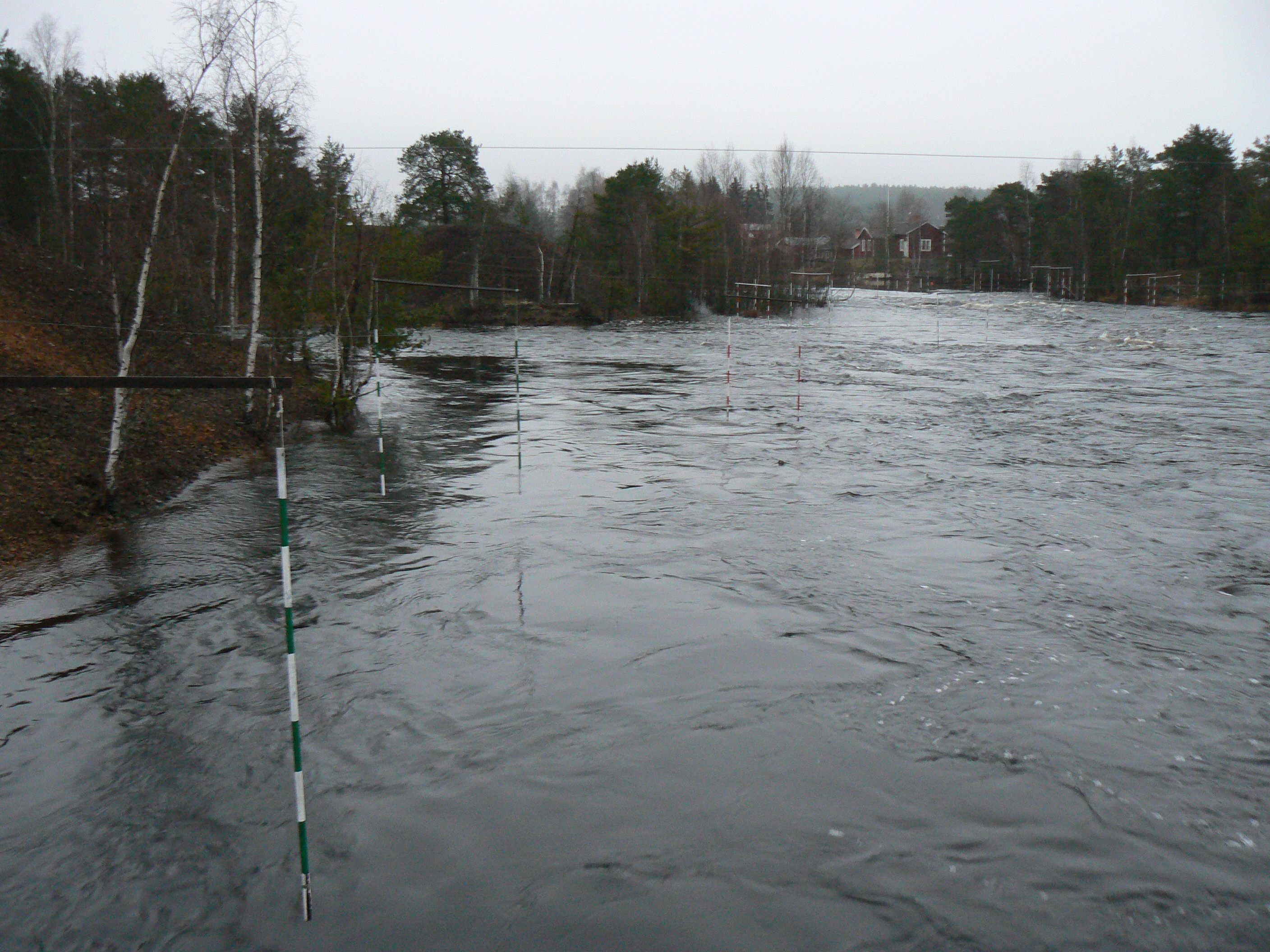 Sundbornsån: forsen vid utloppet i Hosjön. The Sundborn river, Sweden. Photo by Skvattram 2006-11-25.